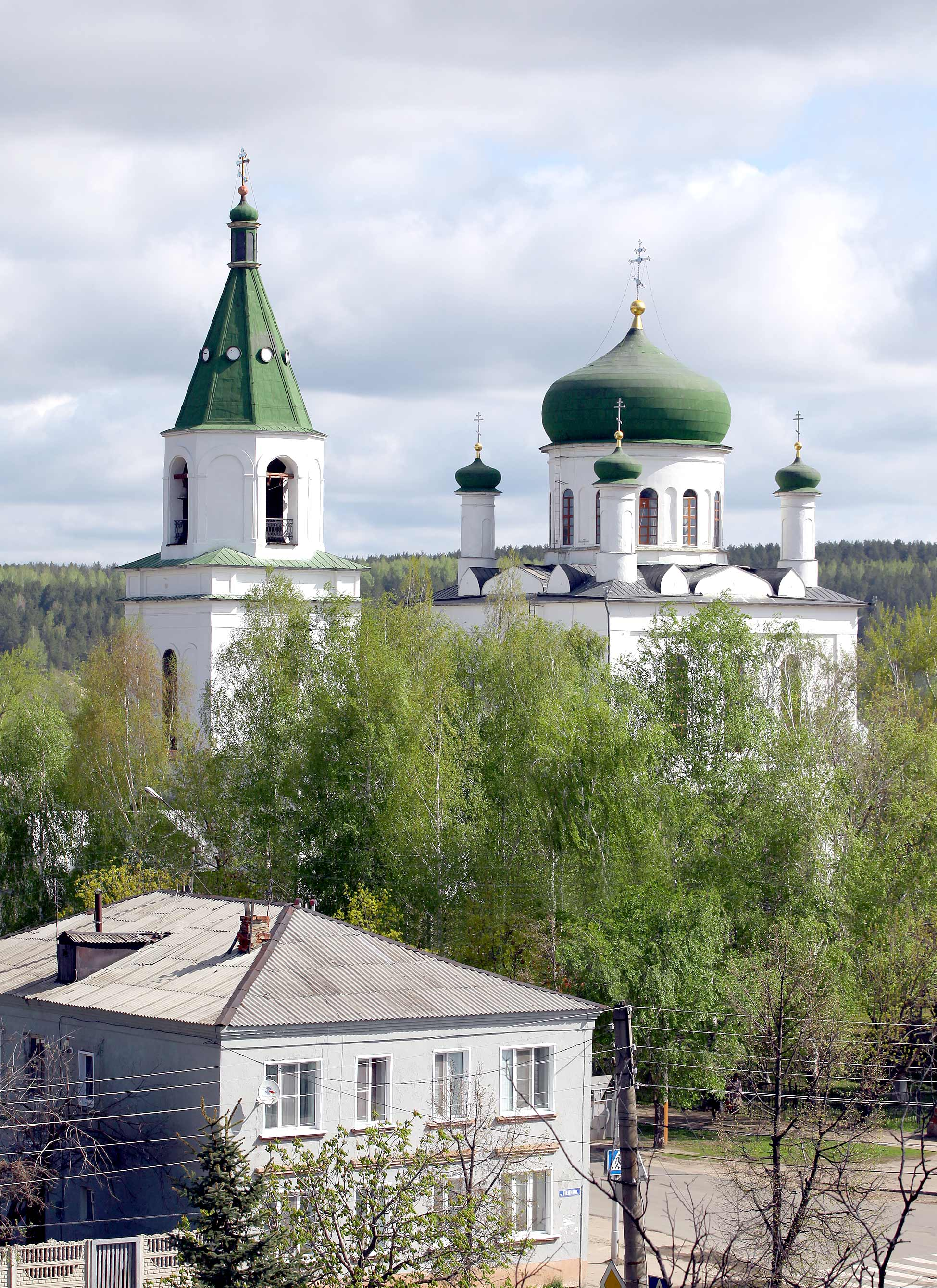 Вид с юго-запада. Расположен в историческом центре города Кузнецка. Построен в 1842-1856 годах.